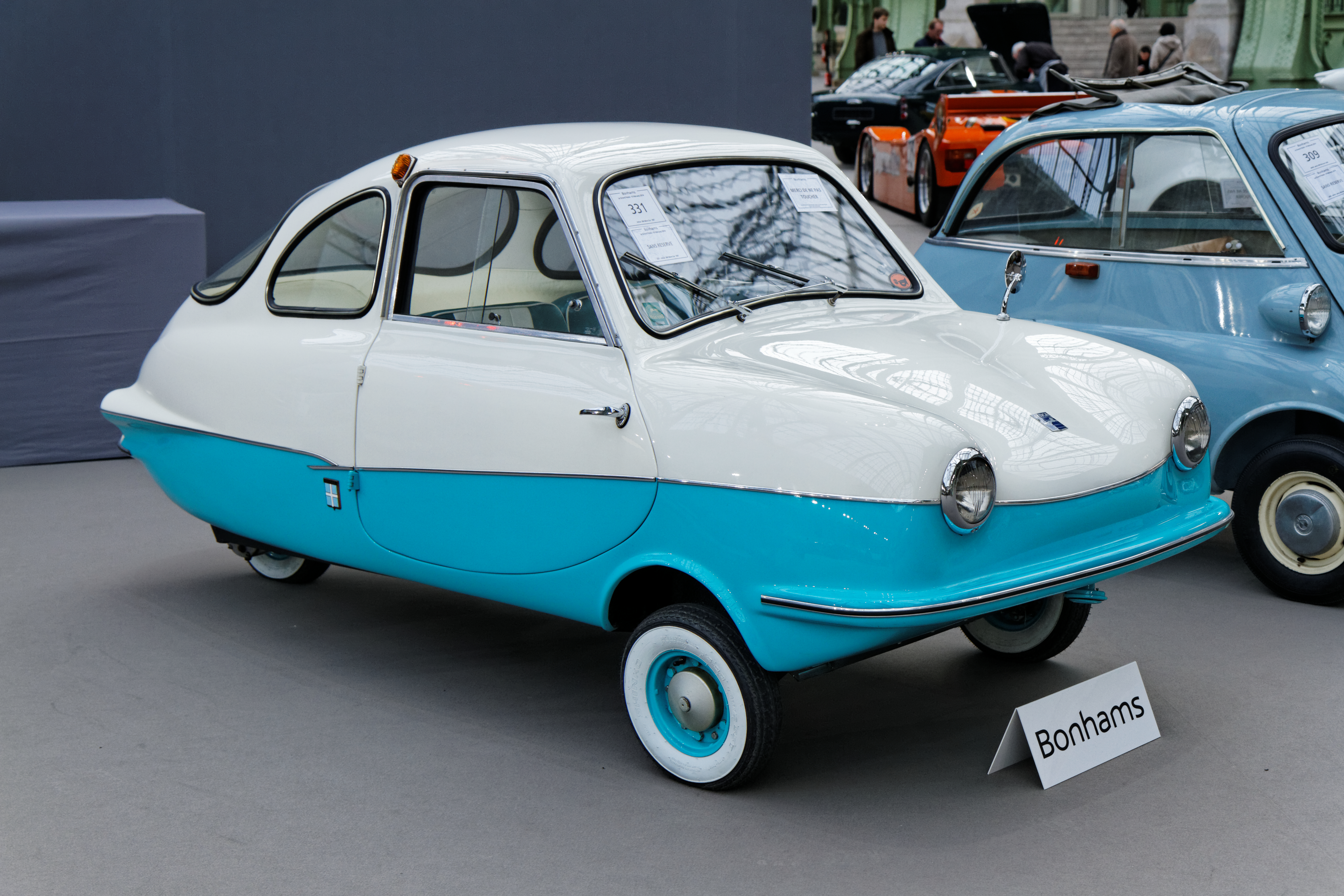 Une Attica 200 Micro Car au Grand Palais lors de la vente Bonhams en février 2014.